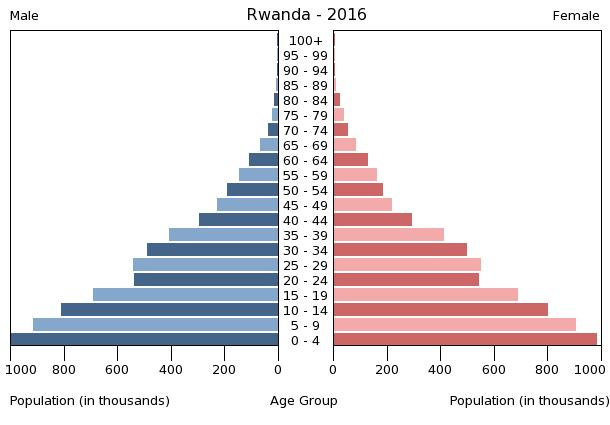 A population pyramid illustrates the age and sex structure of a country's population and may provide insights about political and social stability, as well as economic development. The population is distributed along the horizontal axis, with males shown on the left and females on the right. The male and female populations are broken down into 5-year age groups represented as horizontal bars along the vertical axis, with the youngest age groups at the bottom and the oldest at the top. The shape of the population pyramid gradually evolves over time based on fertility, mortality, and international migration trends.